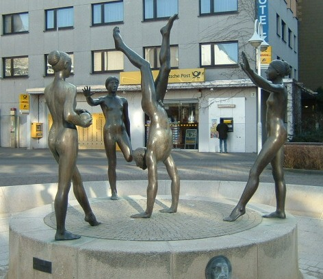 Schwalbach am Taunus, Brunnen von Willi Schmidt am Marktplatz in der Limesstadt, Turnende Jugendliche